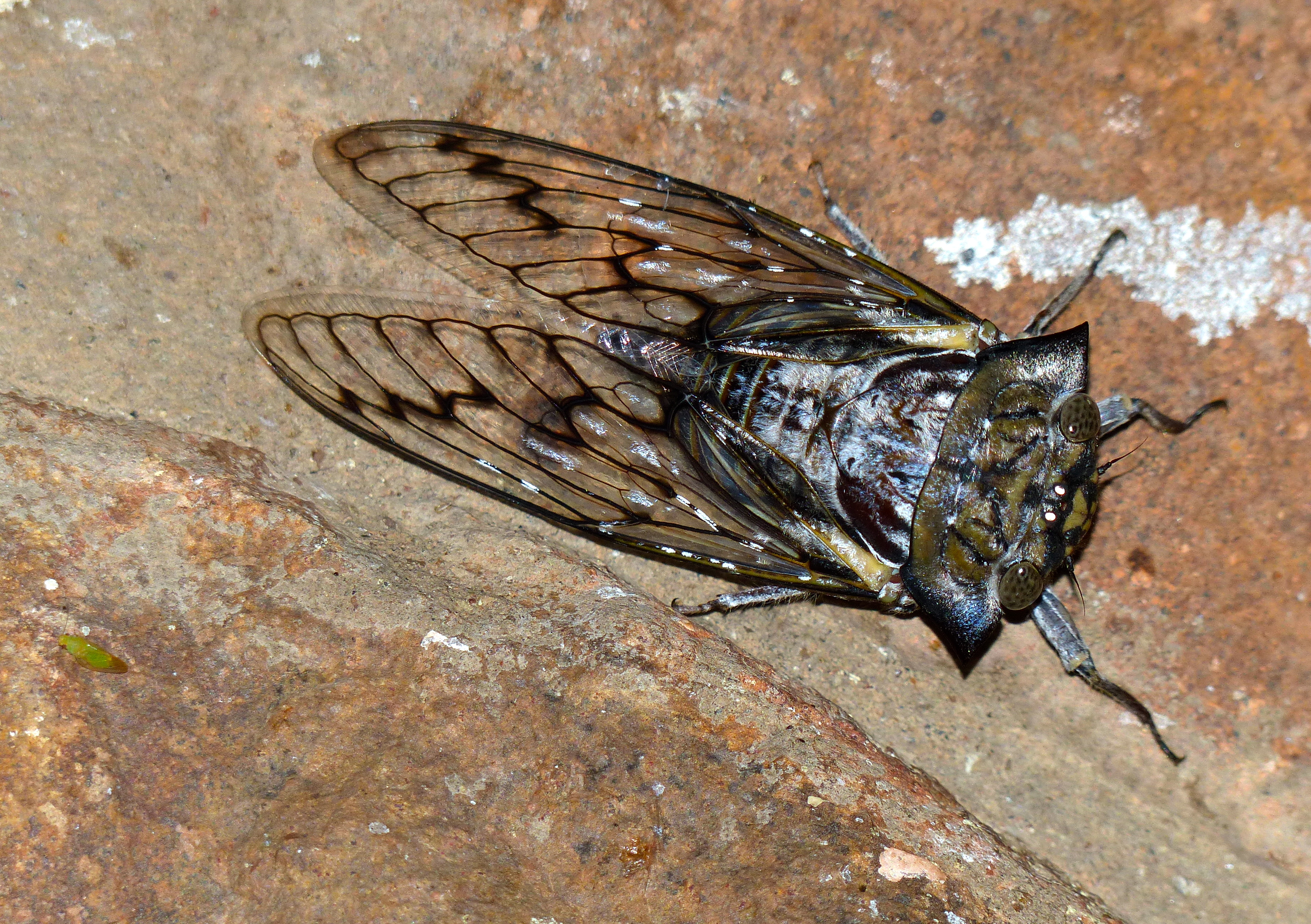 Bungalow N°51, Mopani Camp, Kruger NP, SOUTH AFRICA